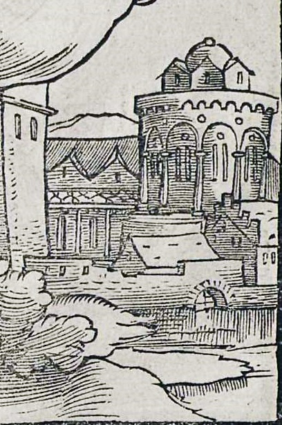 Speyer, Hl. Grab Kirche, 1545. Ausschnitt aus Wappen von Speyer, in: Jacob Koebel (Vorrede): Wapen. Des Heyligen Römischen Reichs Teutscher nation. Gedruckt bei Cyriacus Jacob (evtl. auch Herausgeber/Autor), Frankfurt am Main 1545, Holzschnitte von Jacob Kallenberg.